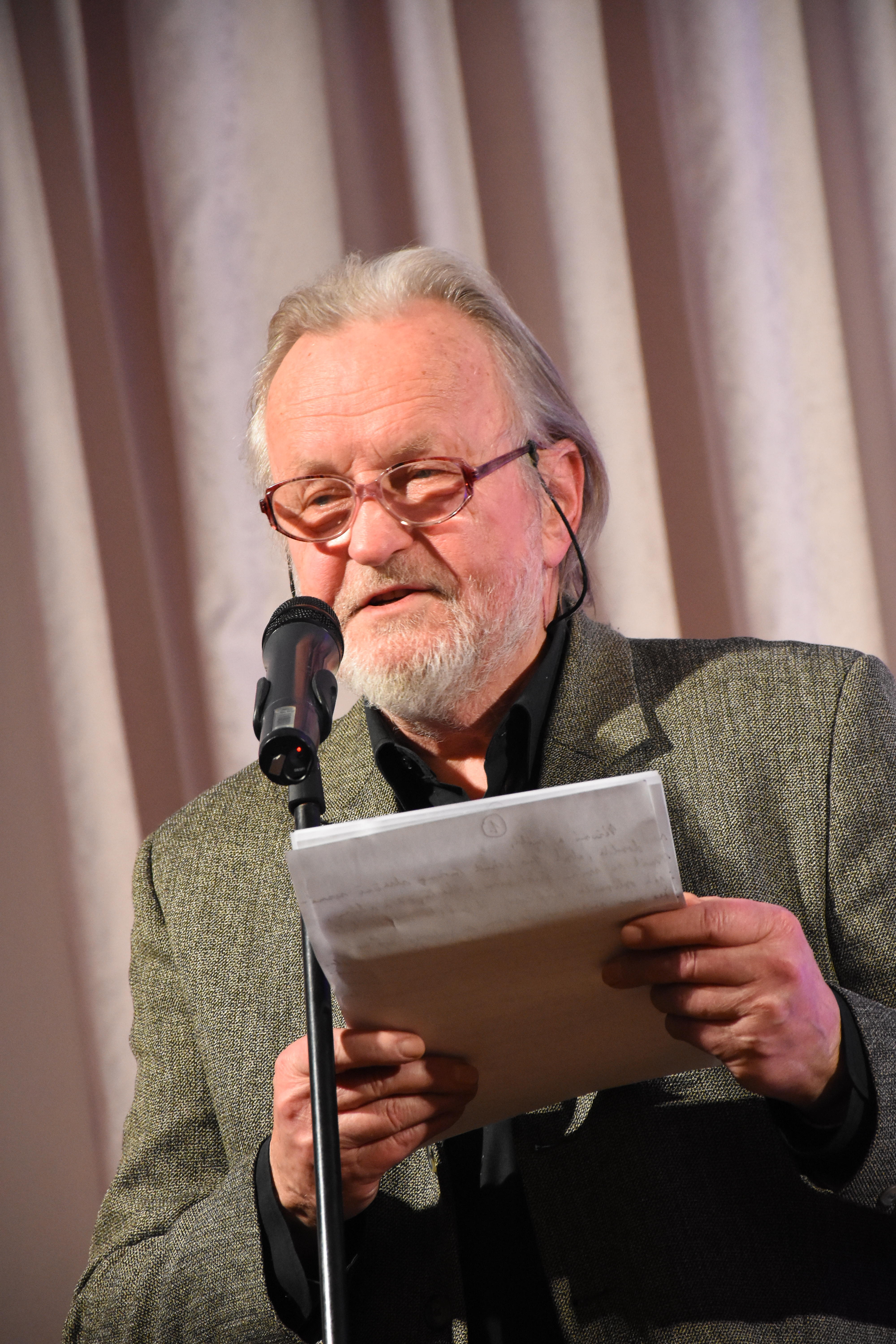 Setkání signatářů k 40. výročí Charty 77, Palác Lucerna, Praha, 7. ledna 2017Tomáš Hradílek